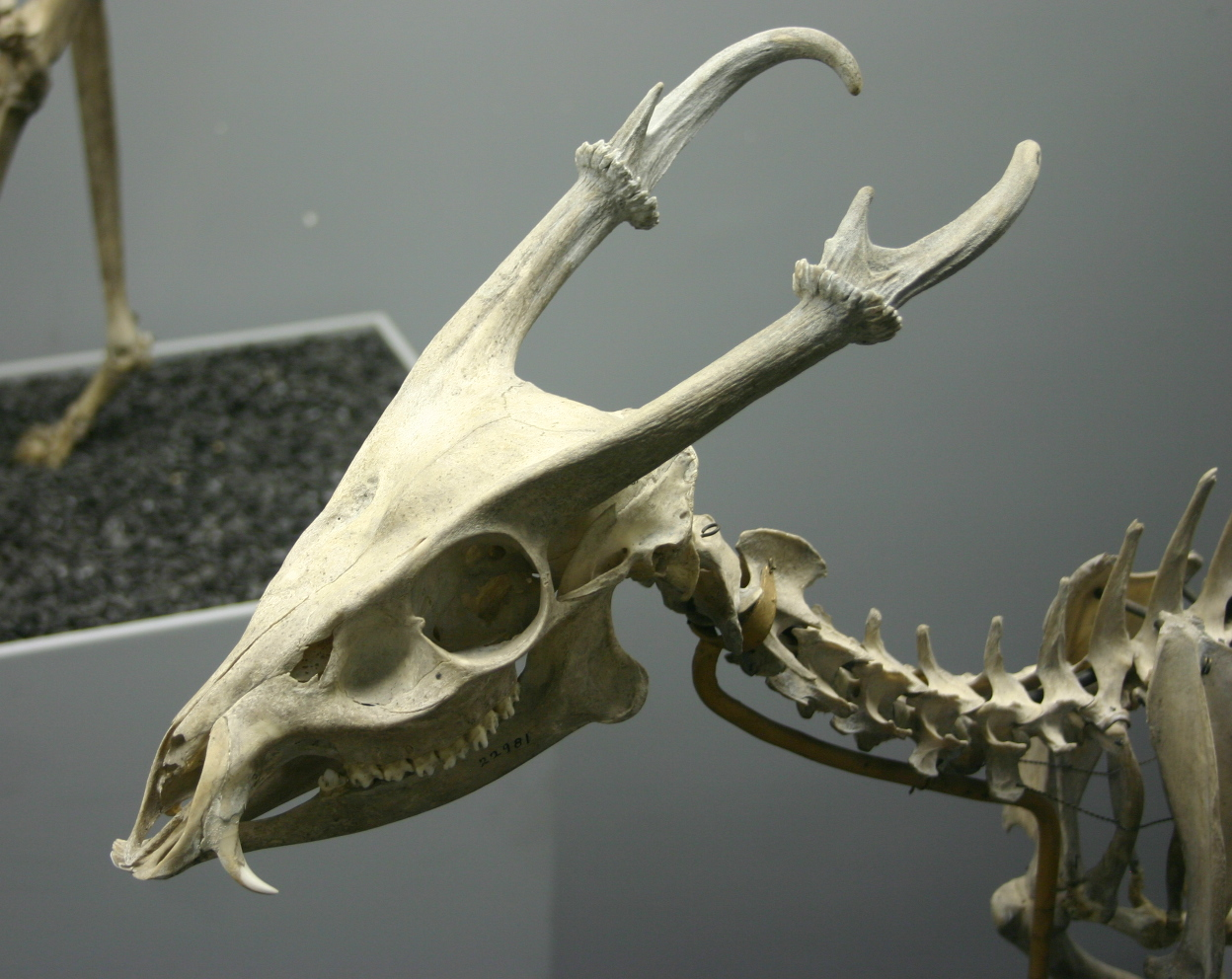 Muntiacus muntjak Visit my blog at